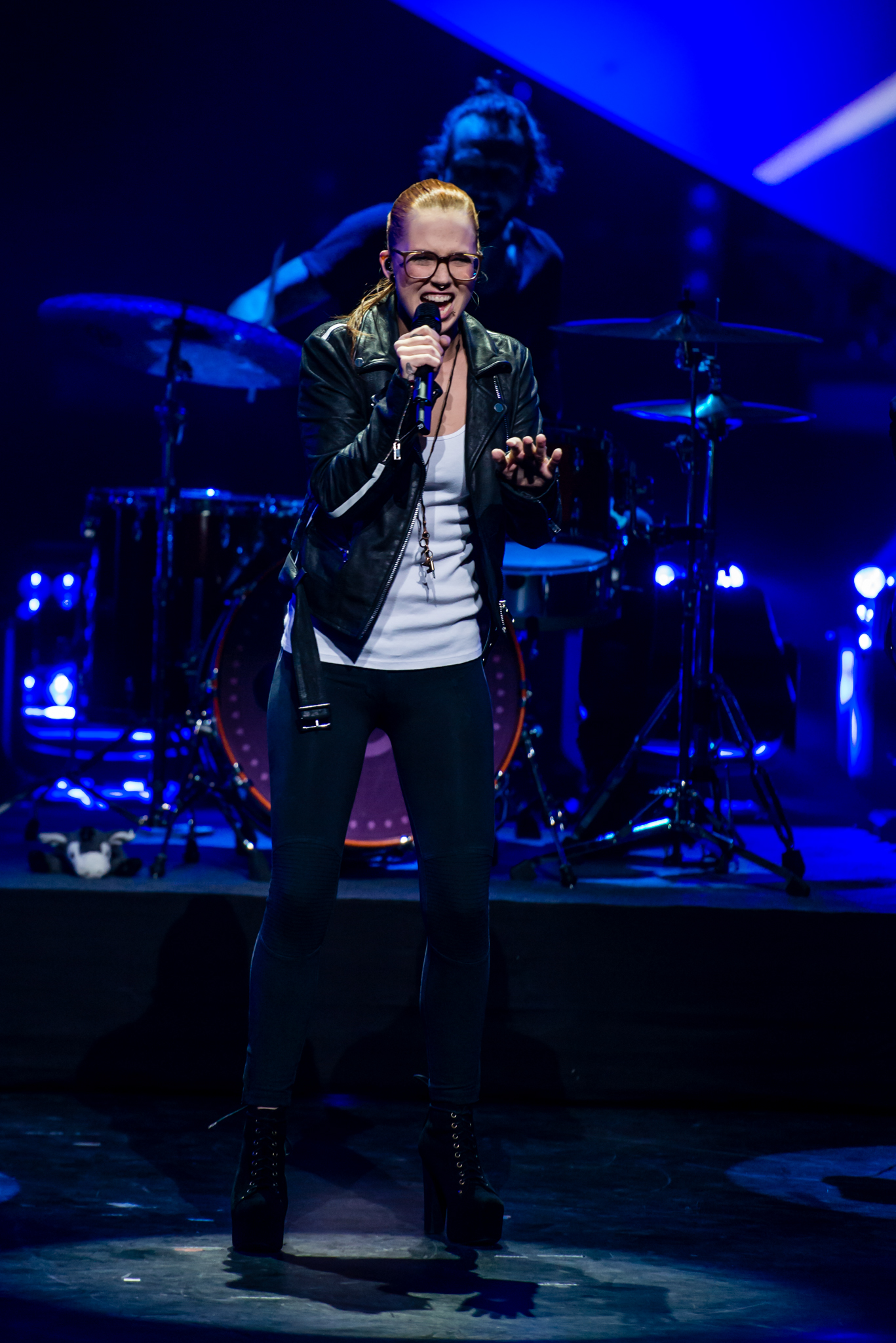 'Eurovision Song Contest 2015 - Unser Song für Österreich Live Show': 'Stefanie Heinzmann'